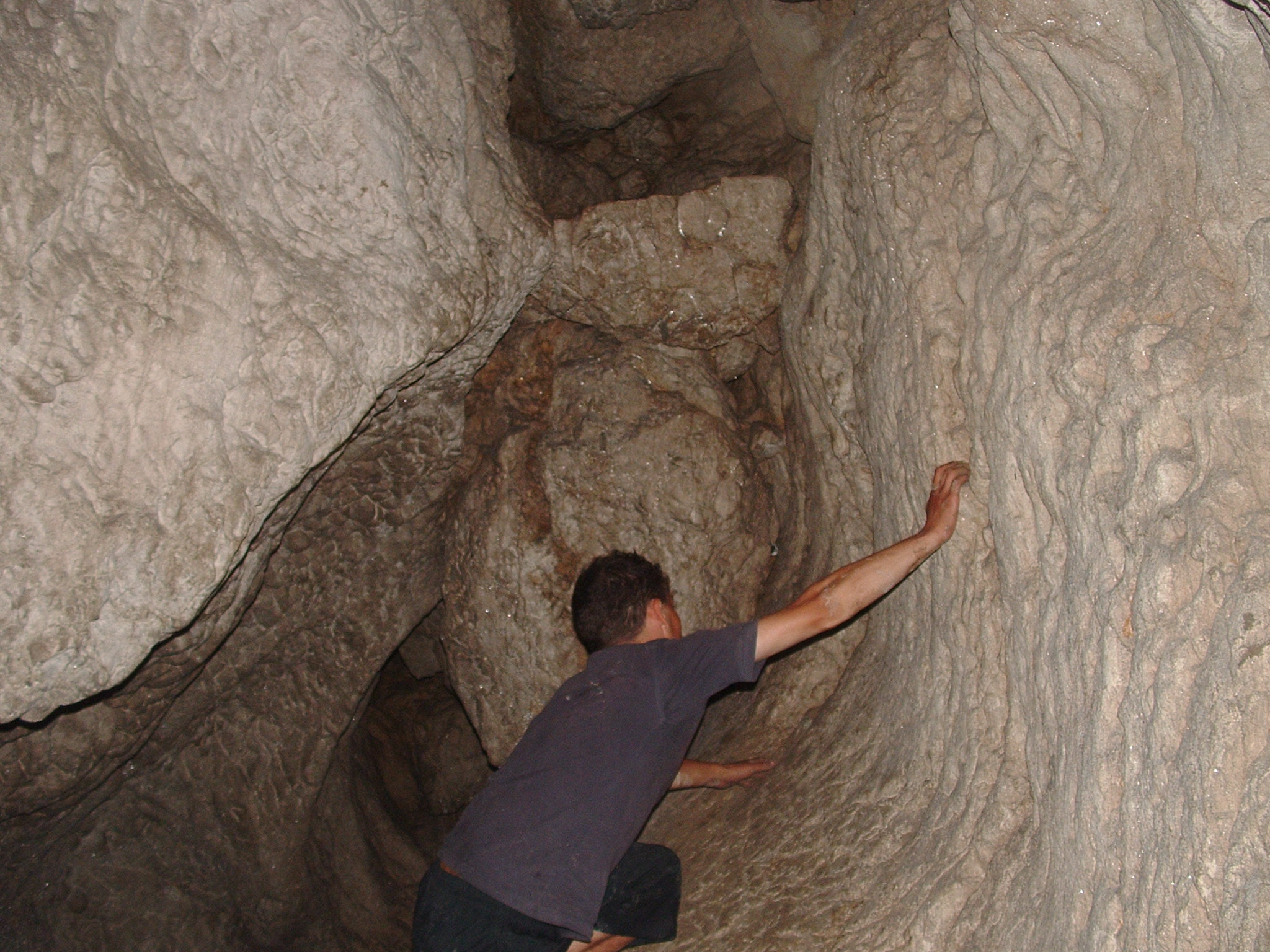 "Liliecilor" cave